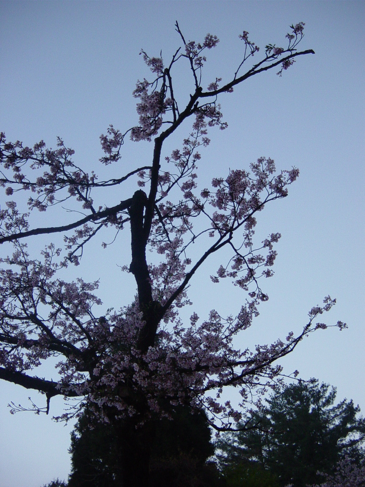 Sakura in Ali Mountain, Taiwan